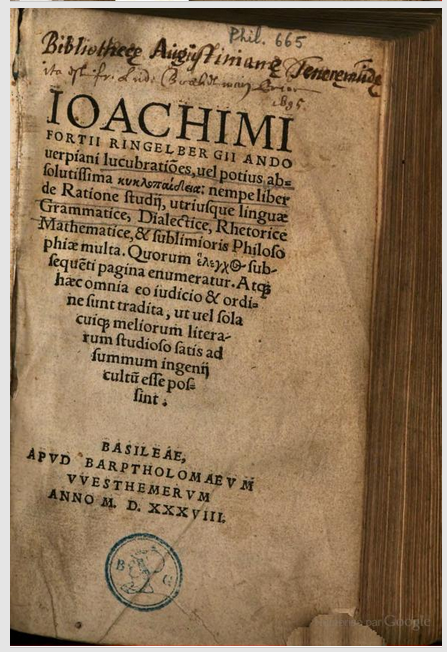 Couverture du livre de Ringelberg, Lucubrationes (1538)